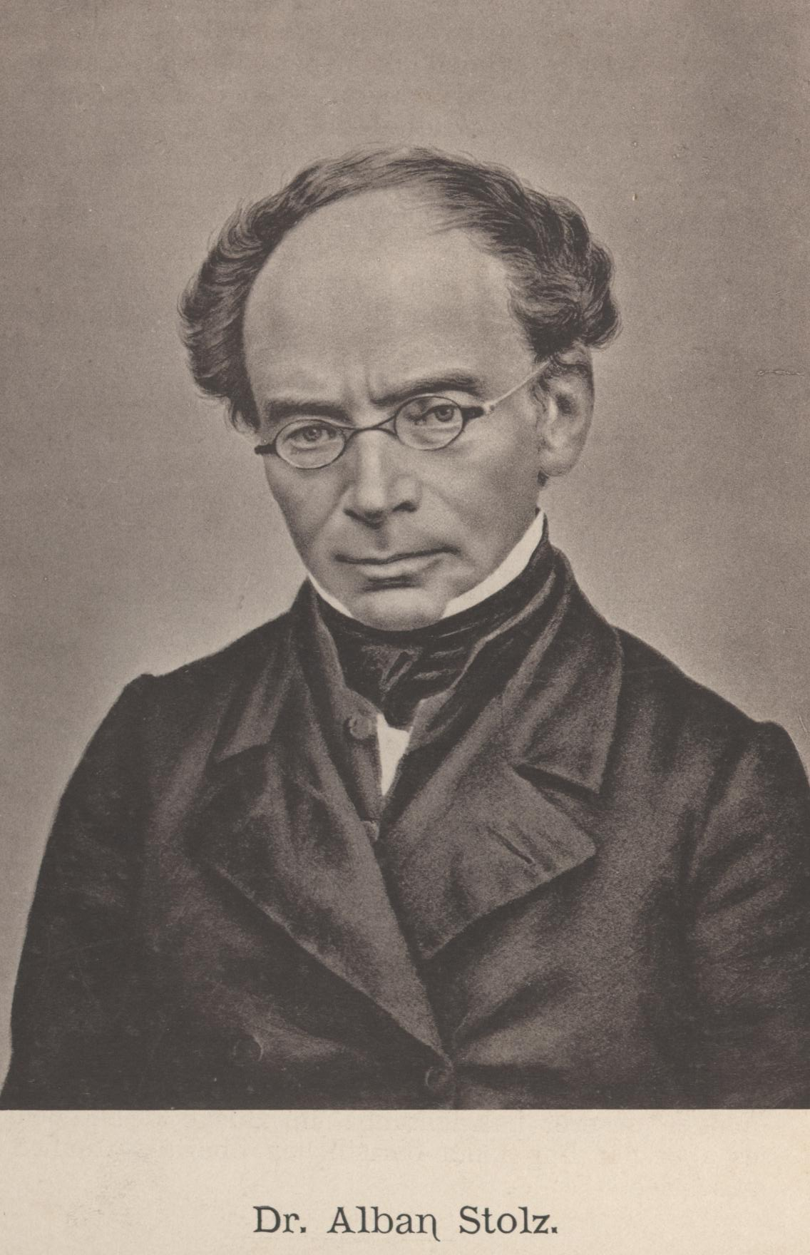 Professor Alban Stolz, Schriftsteller, kath. Theologe